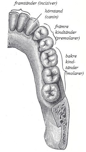 Halv överkäke